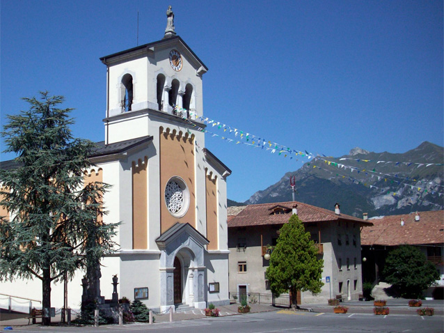 La chiesa e la piazza di Fiavé, prossima alla festa immigrati trentini all'estero e schutzen.